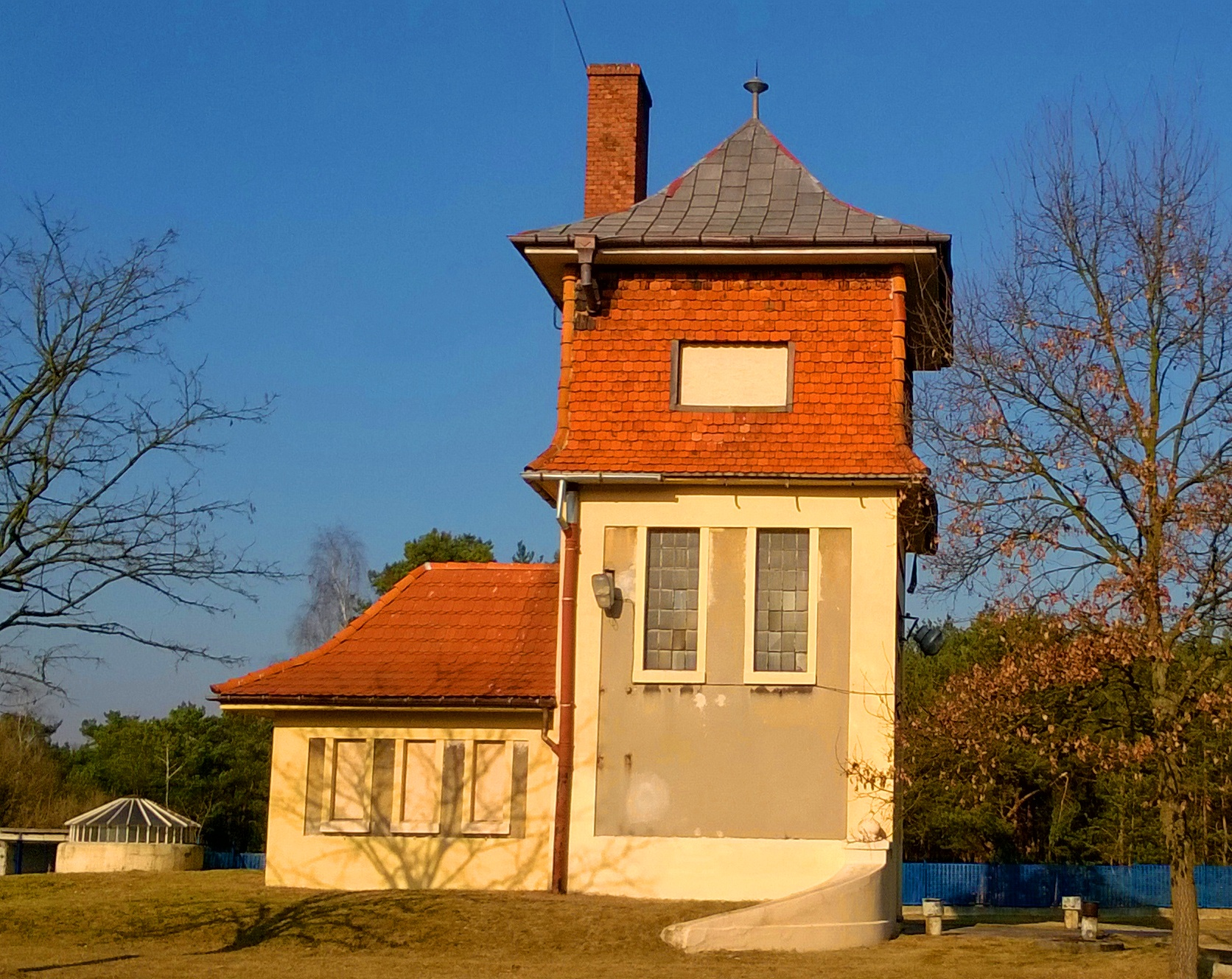 Stacja pomp Nowe Bielany w Toruniu2